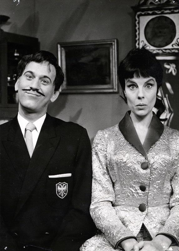 Jan Sjödin och Kerstin Widgren i Dario Fos Tjuvar, lik och fala quinnor vid Helsingborgs stadsteater 1965